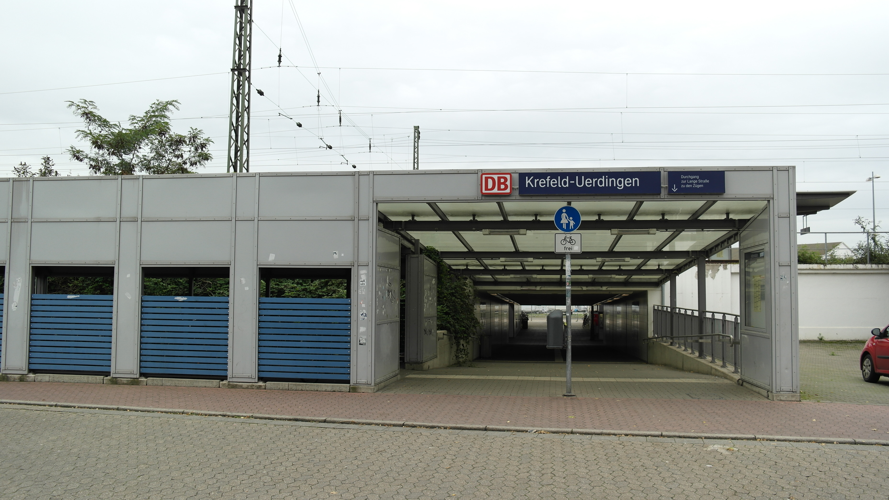 Zugang zum Bahnhof Krefeld Uerdingen von Uerdingen Altstadt aus (mit Fahrradunterstellhaus)